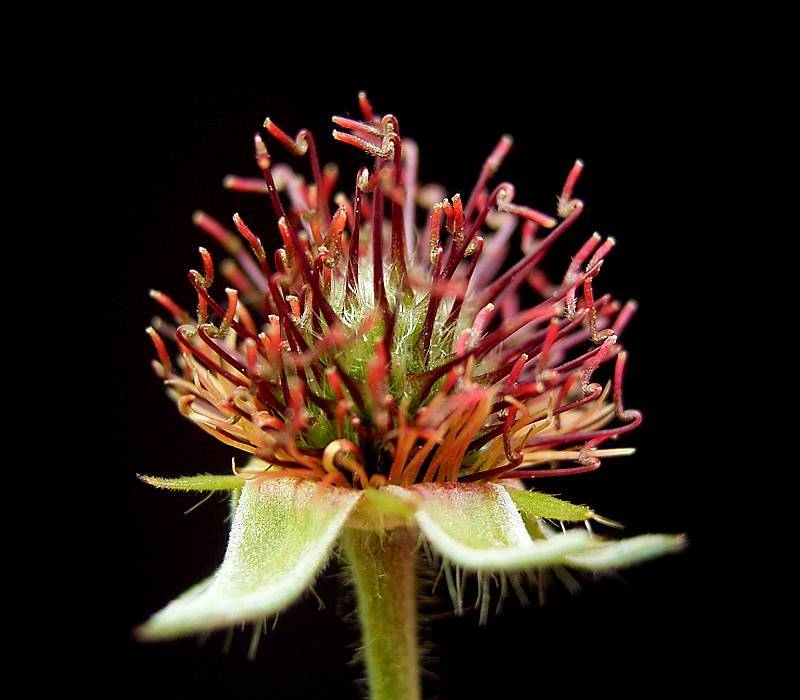 Geum urbanum